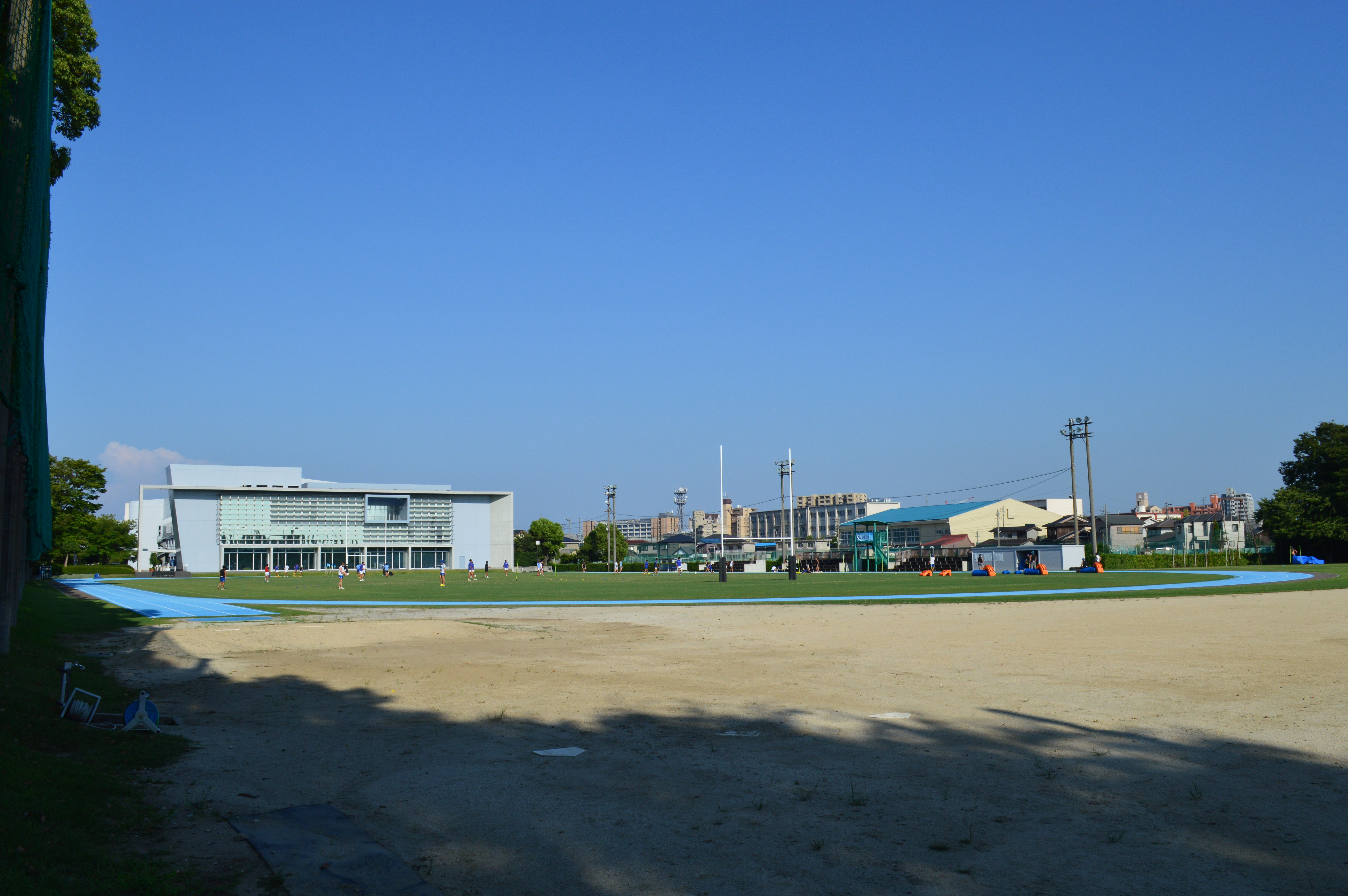 愛知県刈谷市宝町にある豊田自動織機刈谷グラウンド